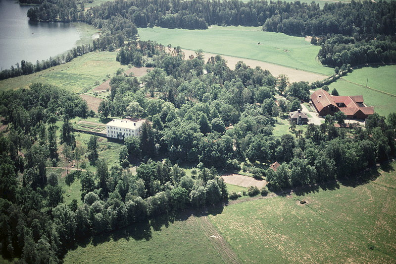 Nådhammars gods. Bilden är tagen mot (väderstreck): SSV